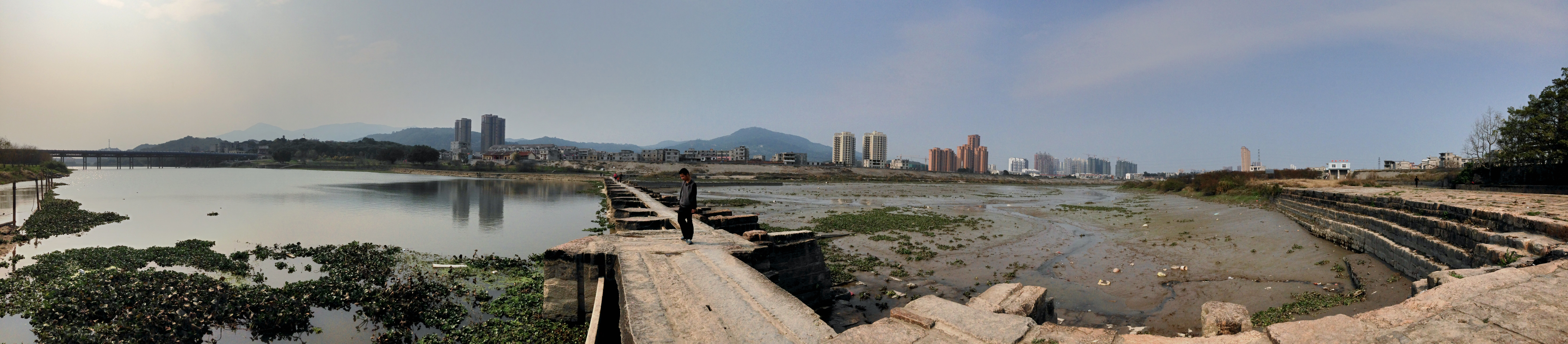 位于中国福建省莆田市的木兰陂全景图。